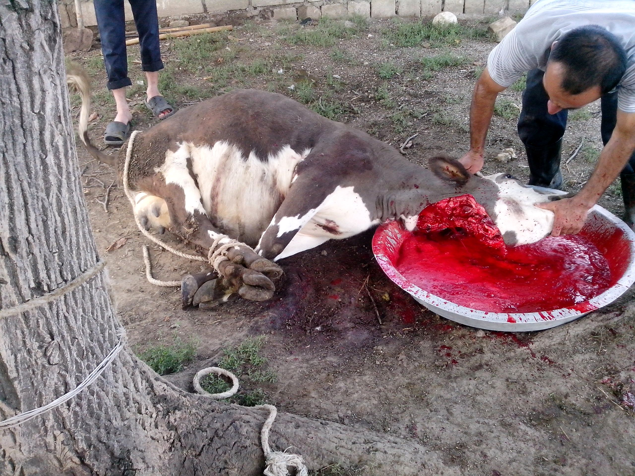 Cekli toyu üçün heyvan kəsimi, Quba, 11 avqust 2013